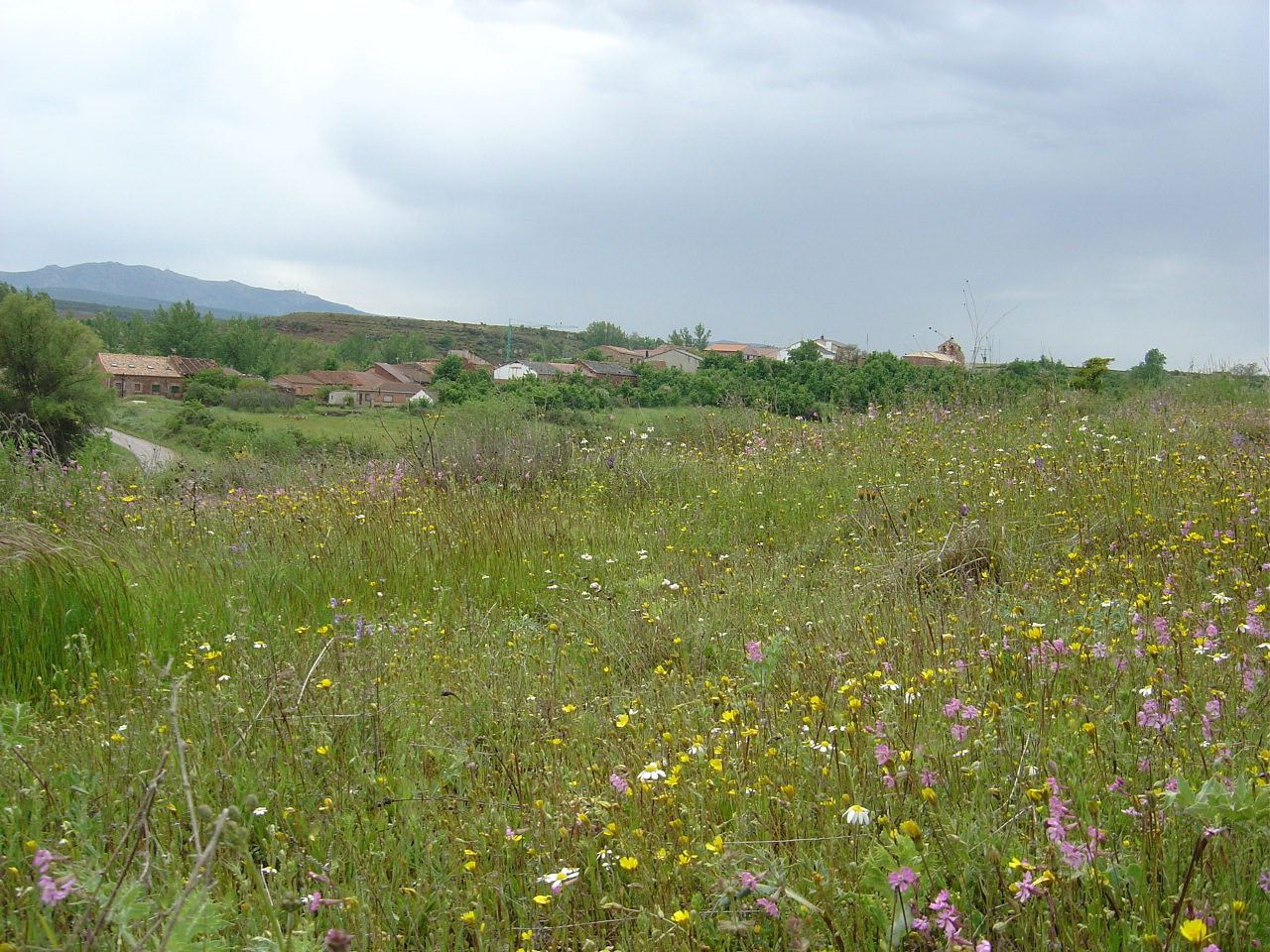 ujados en primavera año 2004